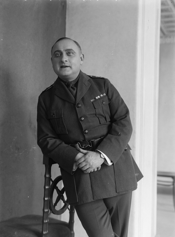 Paul Pinna rolliportree 1927